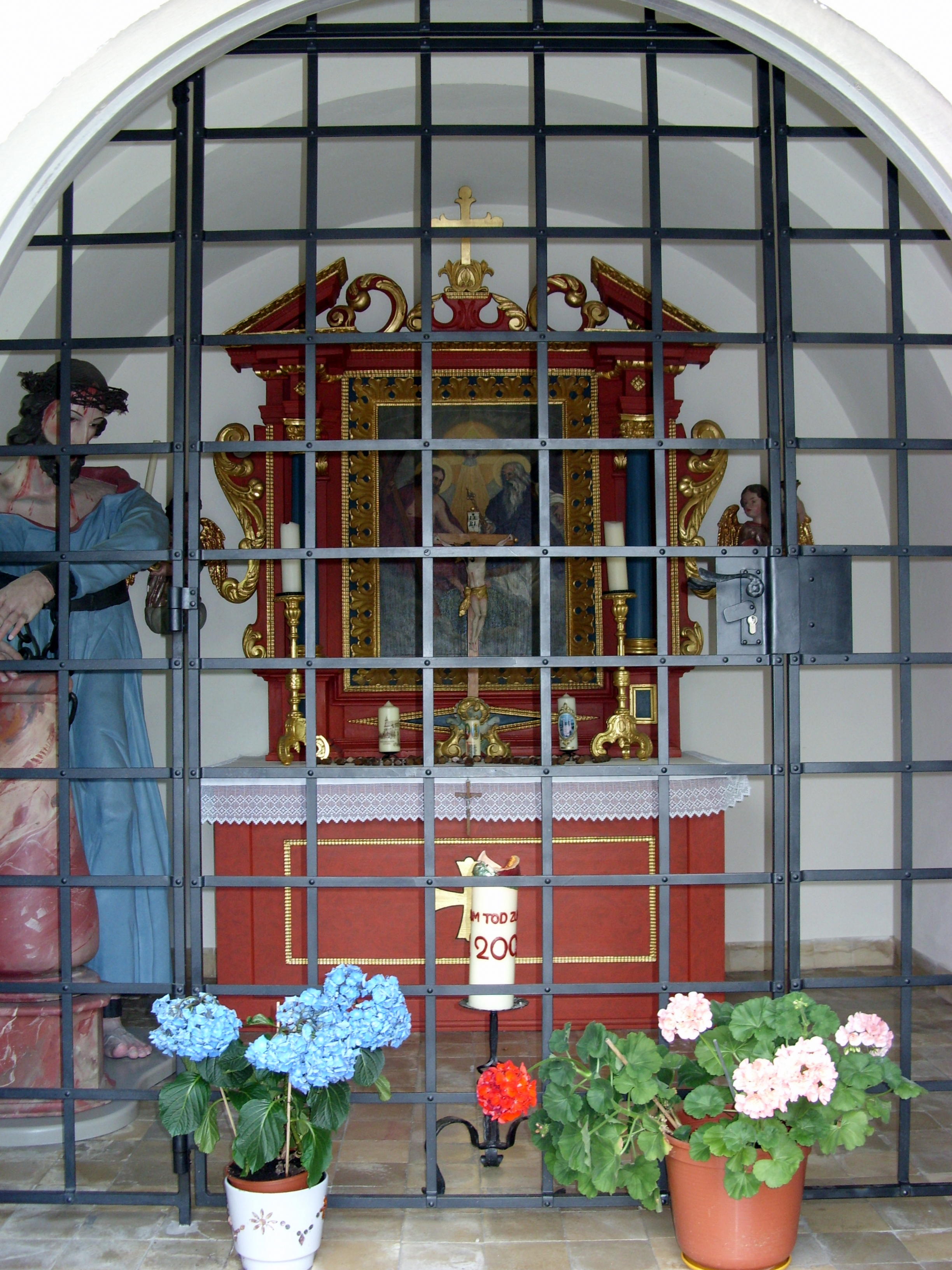 Innenansicht der Dreifaltigkeitskapelle in Wiggensbach, Rohrachstraße.